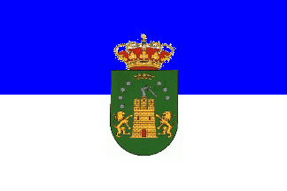 Bandera oficial de Hellín